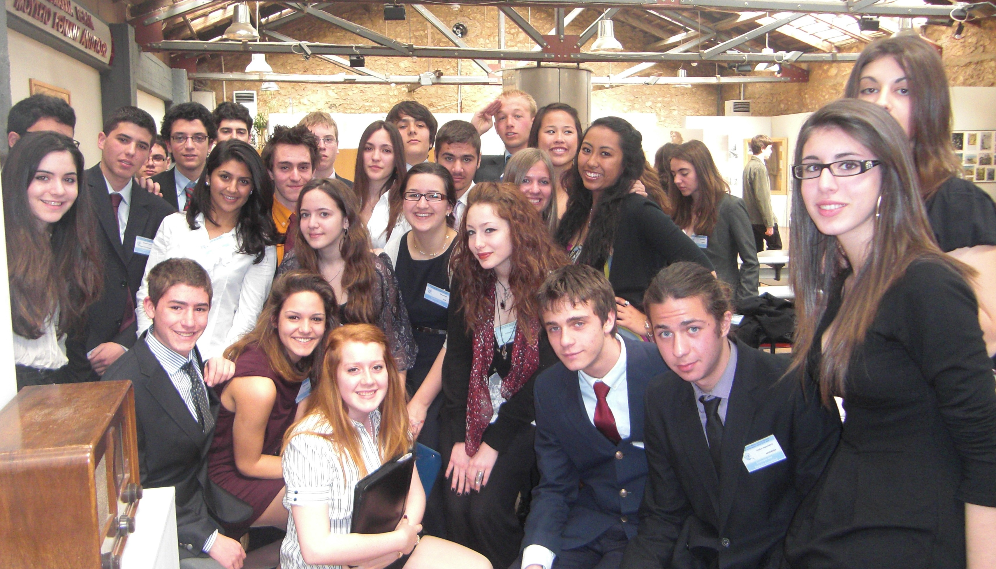 Φωτογραφία των συμμετεχόντων μαθητών στο 13ο Μοντέλο Ηνωμένων Εθνών της Αθήνας.